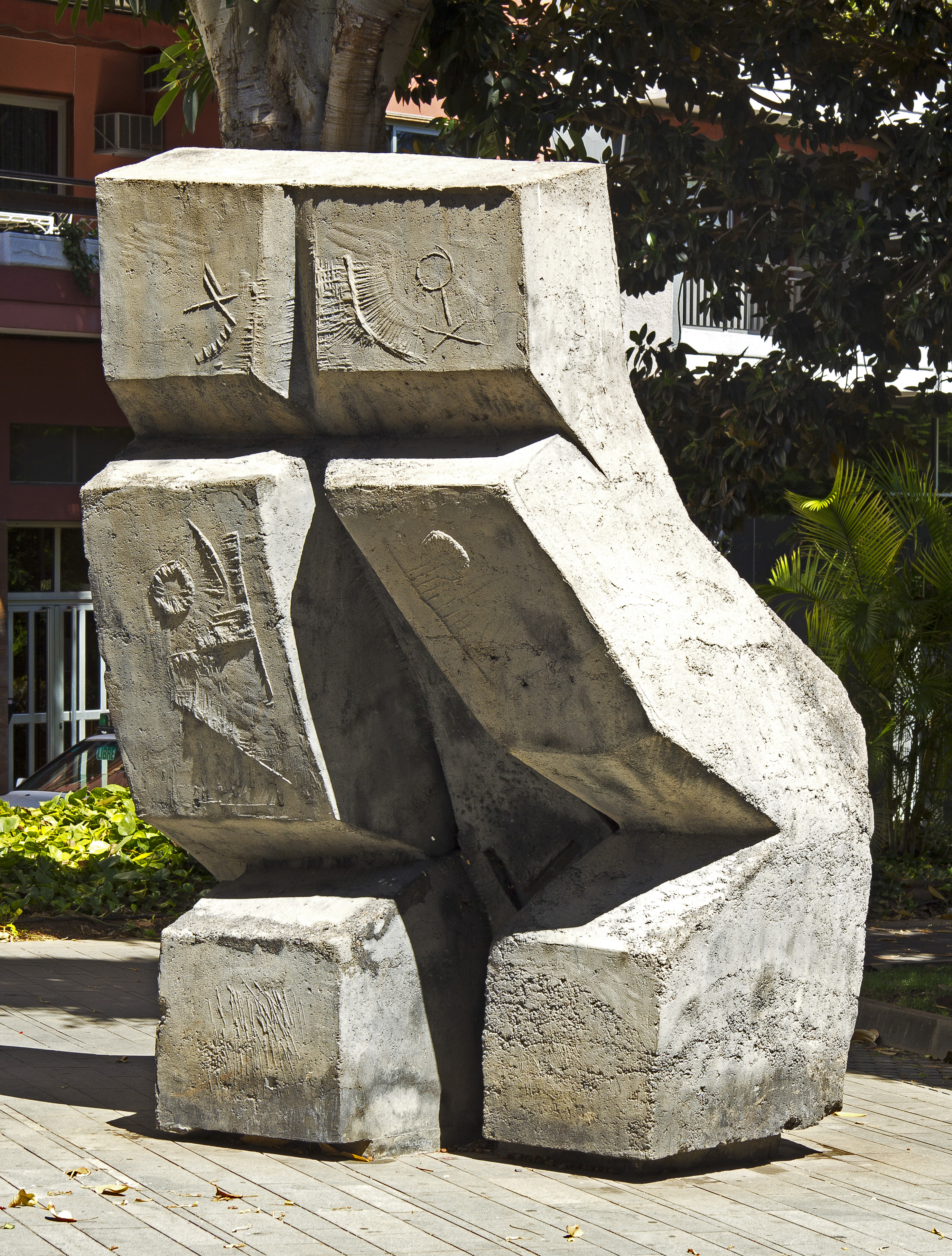 Die Plastik des 1930 in Barcelona (Spanien) geborenen Künstlers Jaume Cubells wurde im Jahr 1973 im Rahmen der „Exposición Internacional de Escultura en la Calle“ der Architektenkammer der Kanarischen Inseln im Parque García Sanabria in Santa Cruz de Tenerife aufgestellt. Die Maße sind 3,40m x 1,78 m x 1,92 m.